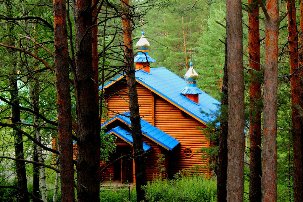 Святой источник Свято-Казанского Чимеевского мужского монастыря: Белозерский район, Курганская область This image is related to the protected area of Russia number 4510007